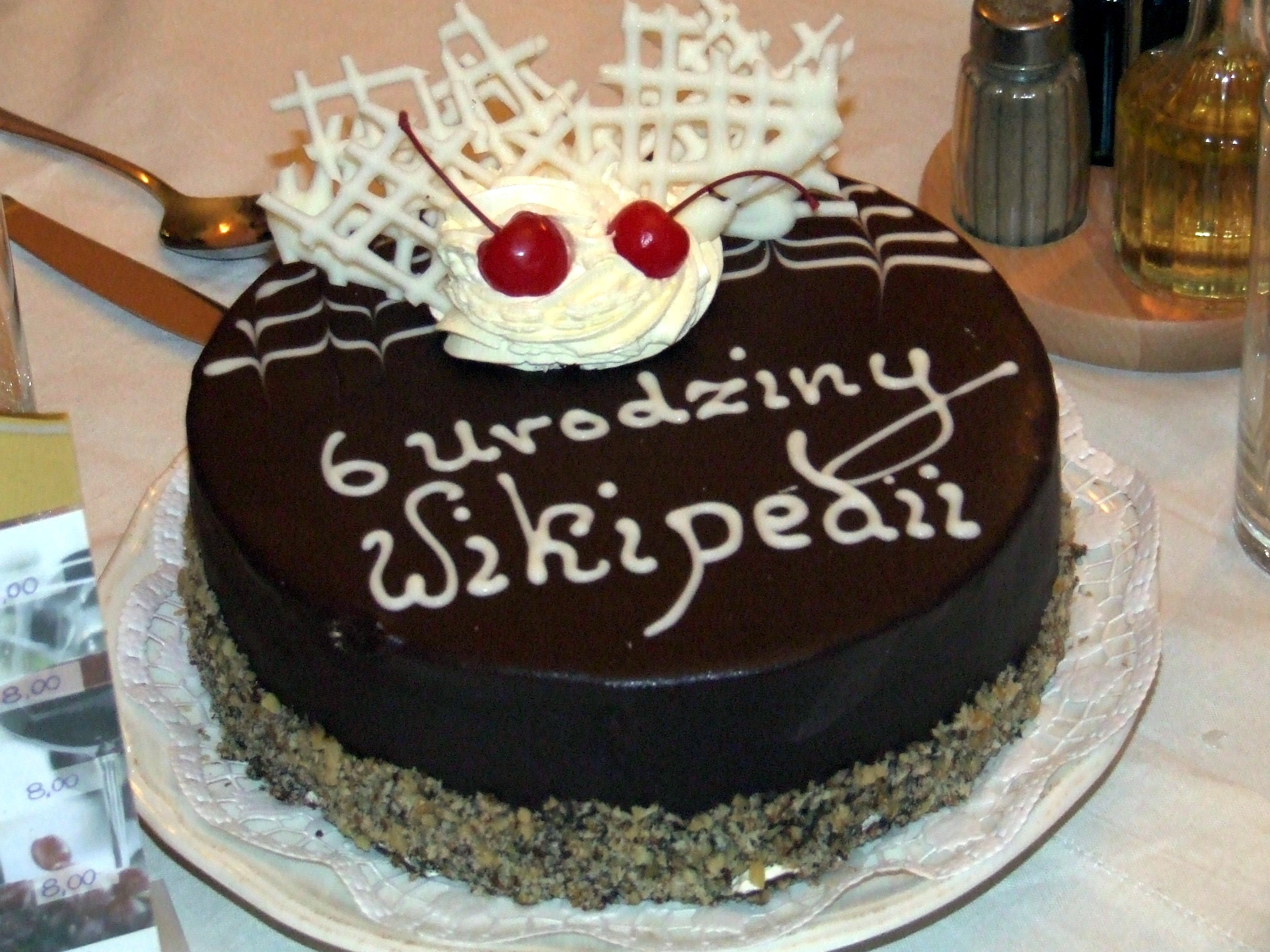 6-te urodziny Wikipedii w Krakowie